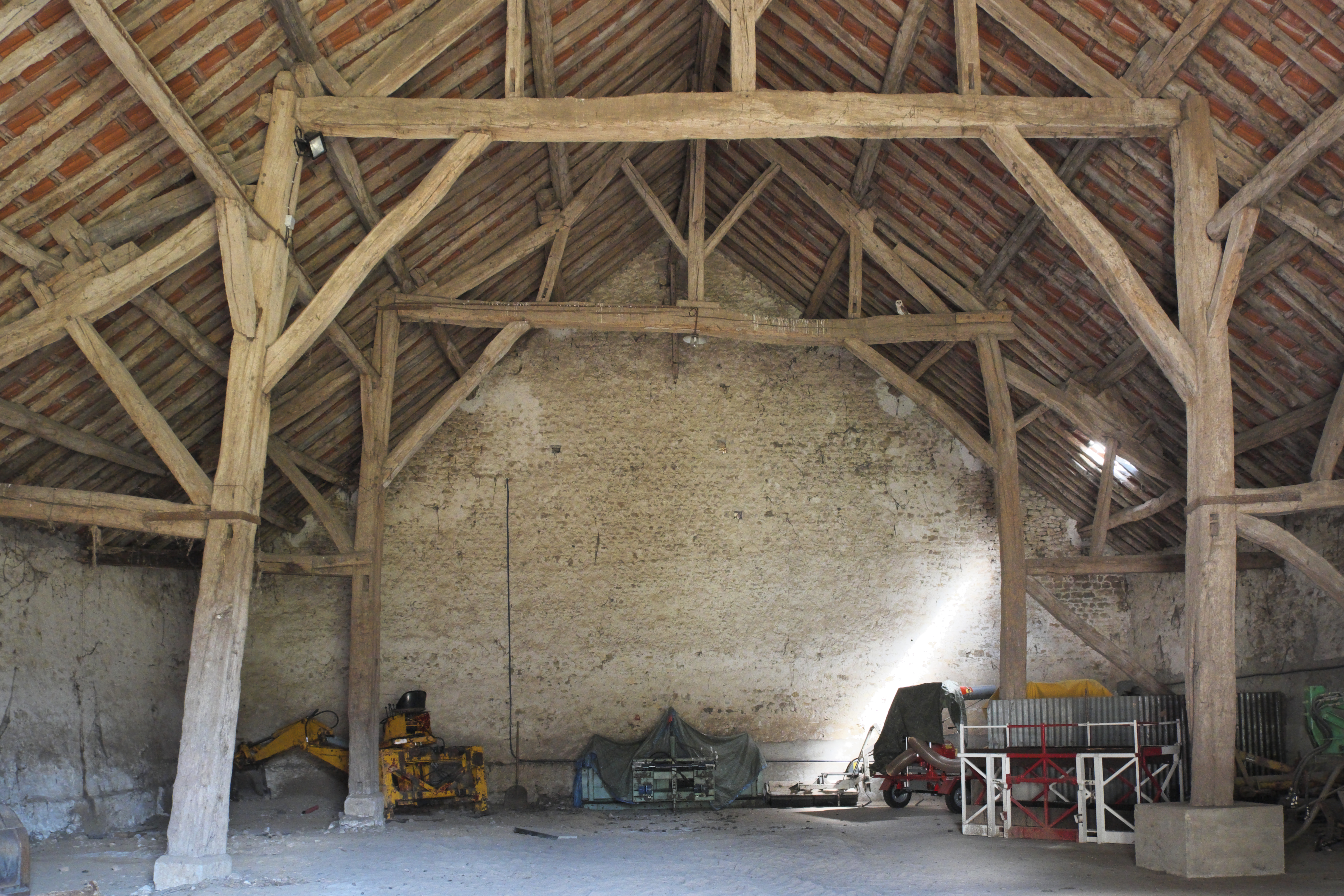 Zehntscheune in Brières-les-Scellés im Département Essonne (Île-de-France/Frankreich)